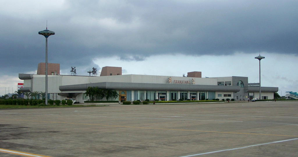 中文（香港）: 自停機坪跳望湛江機場候機樓